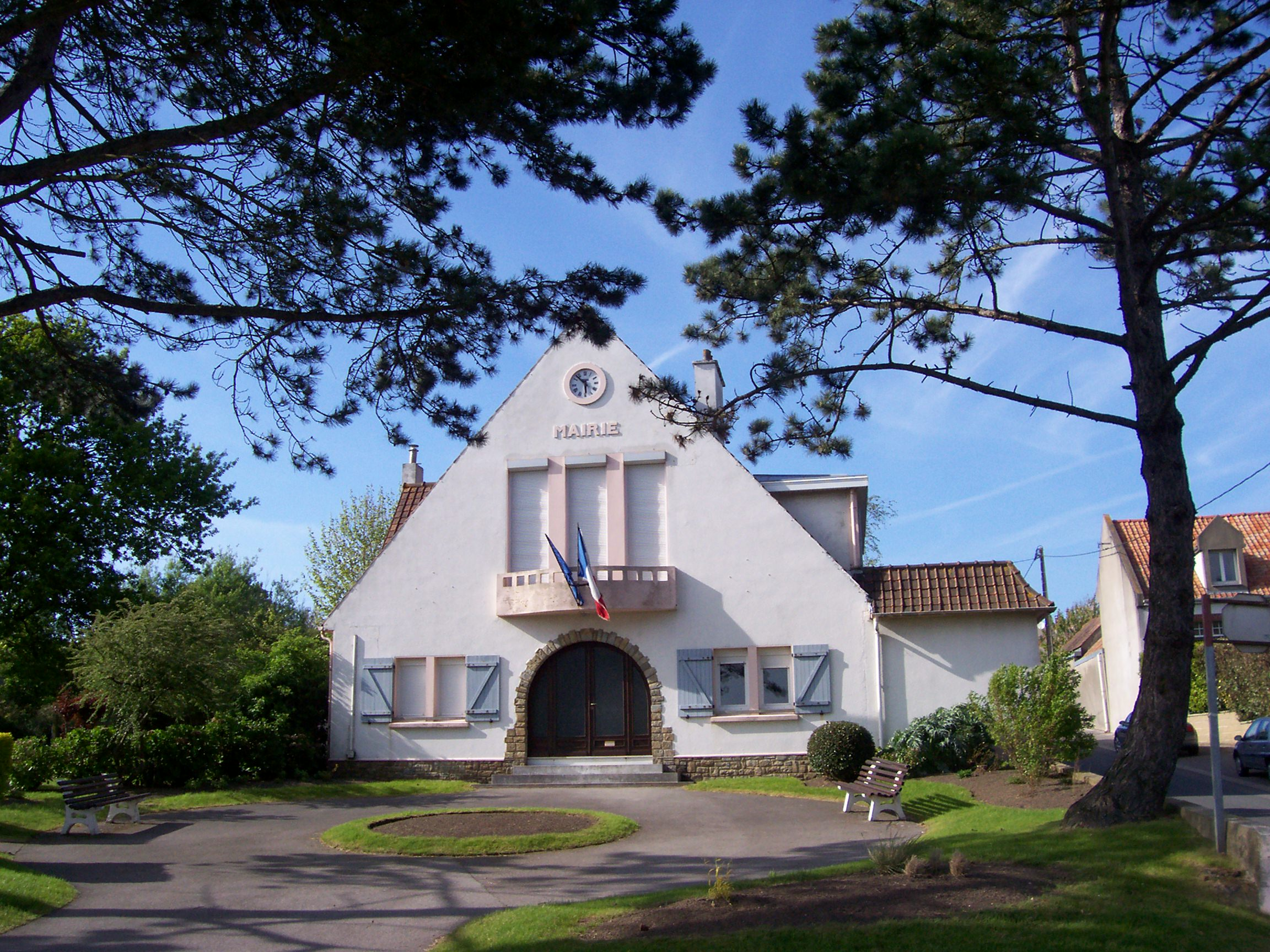 Mairie de Condette, Pas de Calais, France.